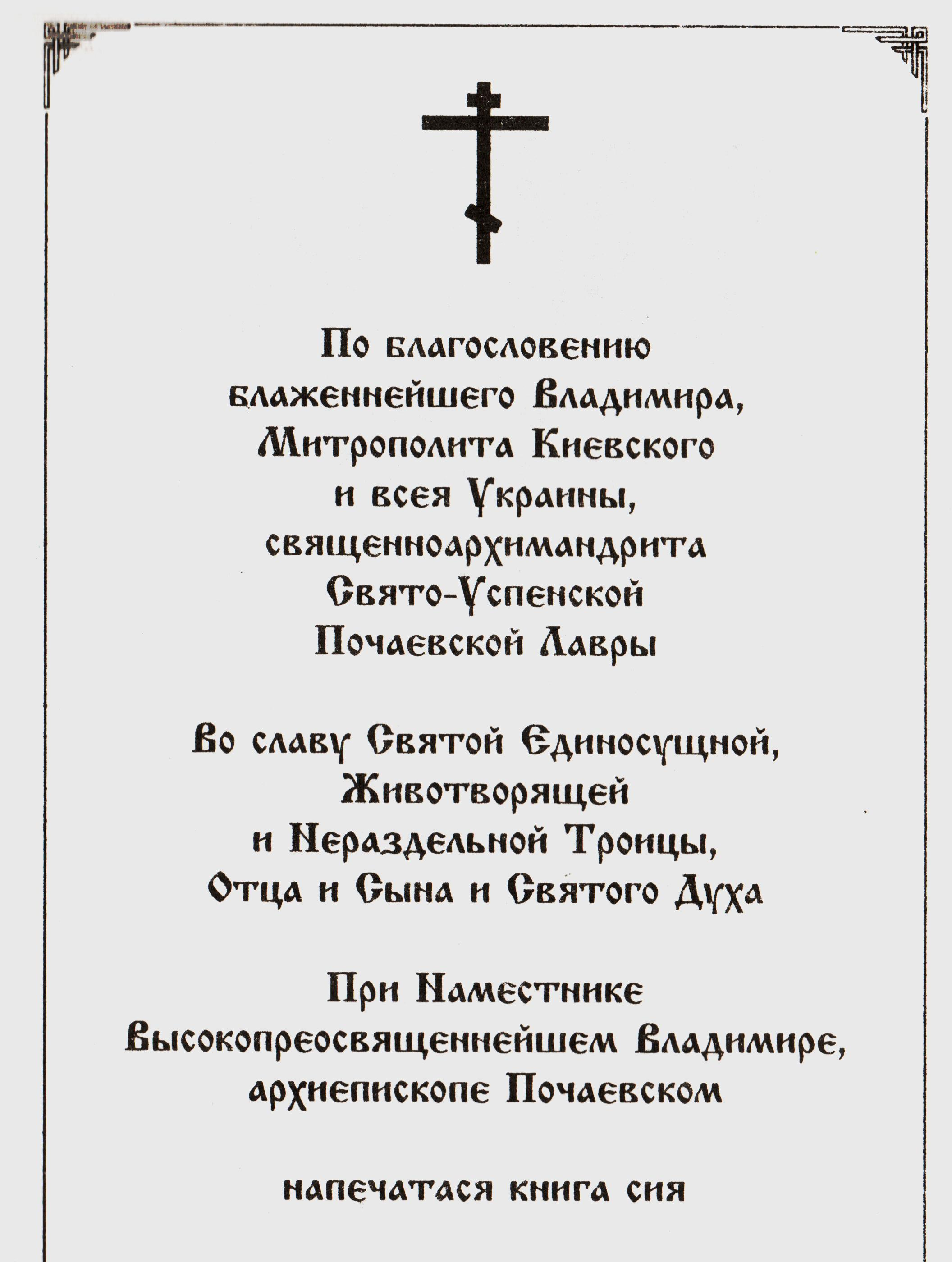 Благословение Митрополита Киевского и всея Украины священноархимандрита Почаевской Лавры Владимира (Сабодана) на русском языке на книге "Псалтирь на всякую потребу" издания Почаевской Лавры. Текст стандартный.